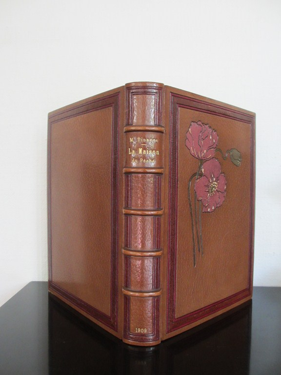 Обложка книги "Дом греха" 1909г.